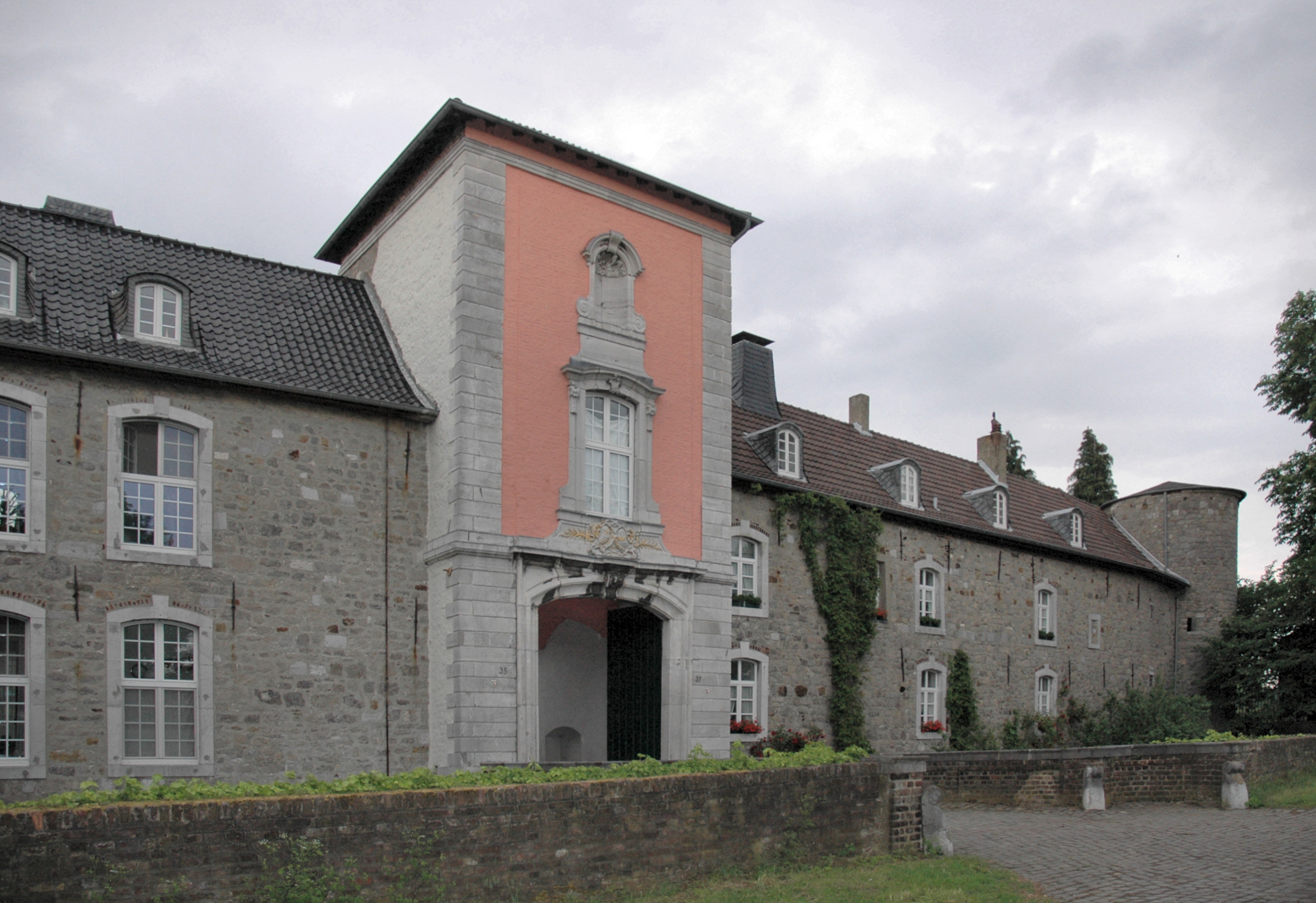 Südflügel des Guts Kalkofen in Aachen, Ansicht von Westen